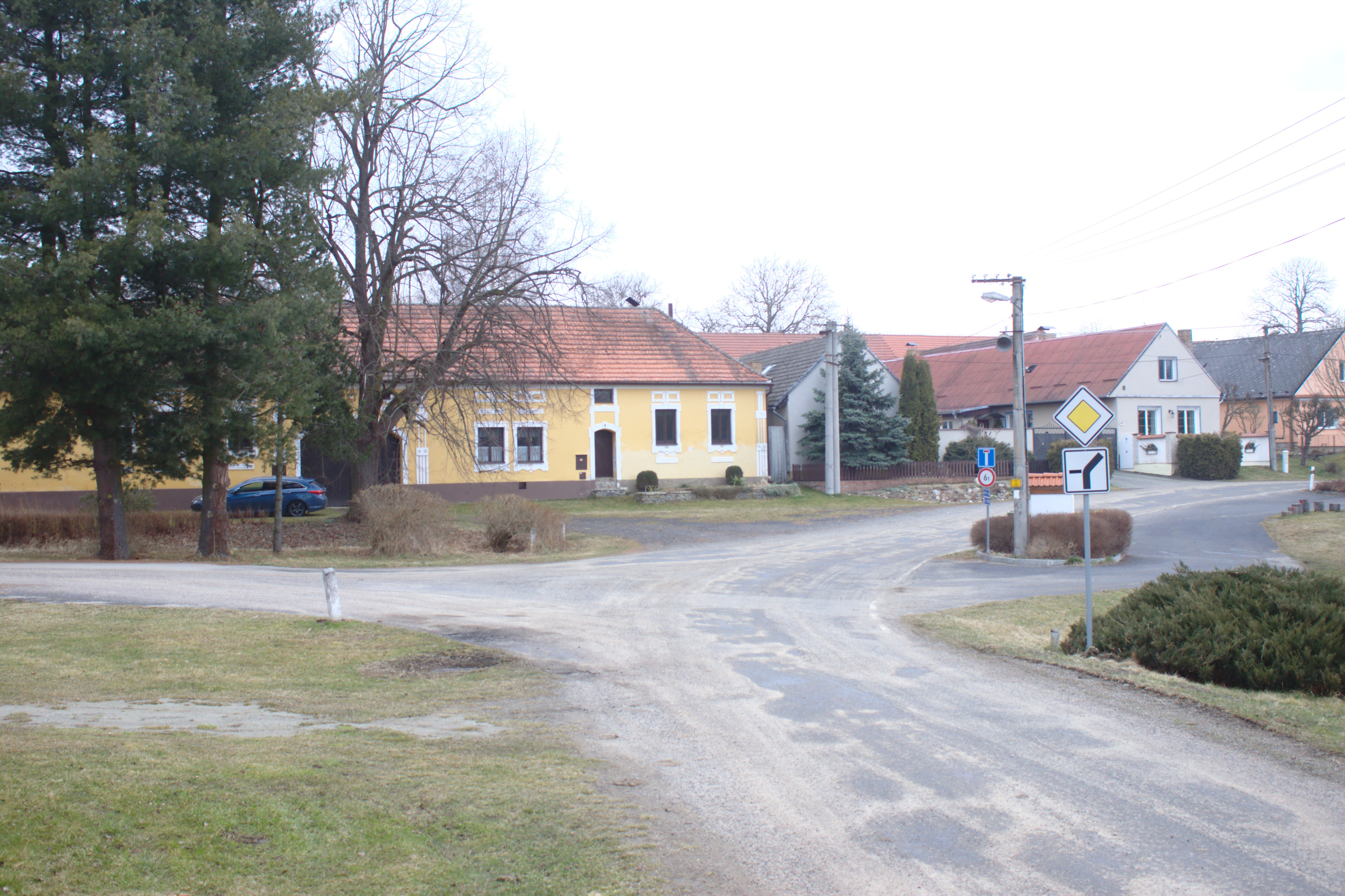 Náves ve vesnici Líšnice Project: Fotíme Česko